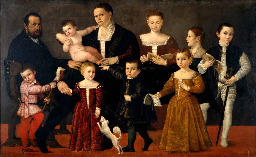 la famiglia di Gianalvise Valmarana, ritratto assieme alla moglie Isabella Nogarola ed a otto dei loro dodici figli. Da sinistra a destra: il capofamiglia, uomo politico e sostenitore del Palladio, poi la consorte che tiene in braccio Massimiliano e che proseguirà i lavori di costruzione del palazzo di famiglia dopo la morte del marito. Seguono Margherita, Penelope, Ascanio, valoroso uomo d'armi già in abiti di cavaliere, Isotta, Antonio, Deianira, ed infine Leonardo a cavalcioni del suo cavalluccio di legno.